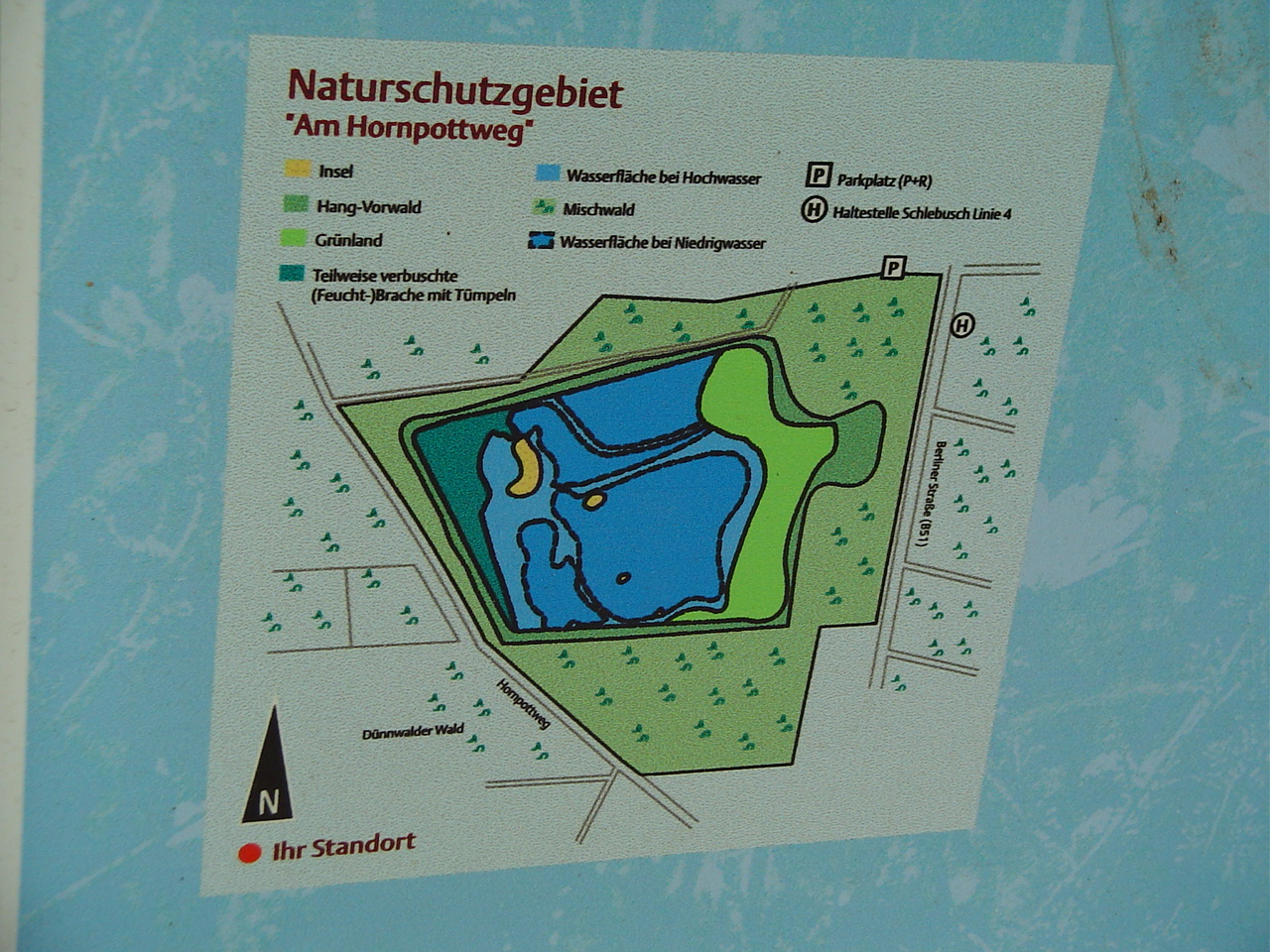 Hornpottweg Kiesgrube, Infoschild